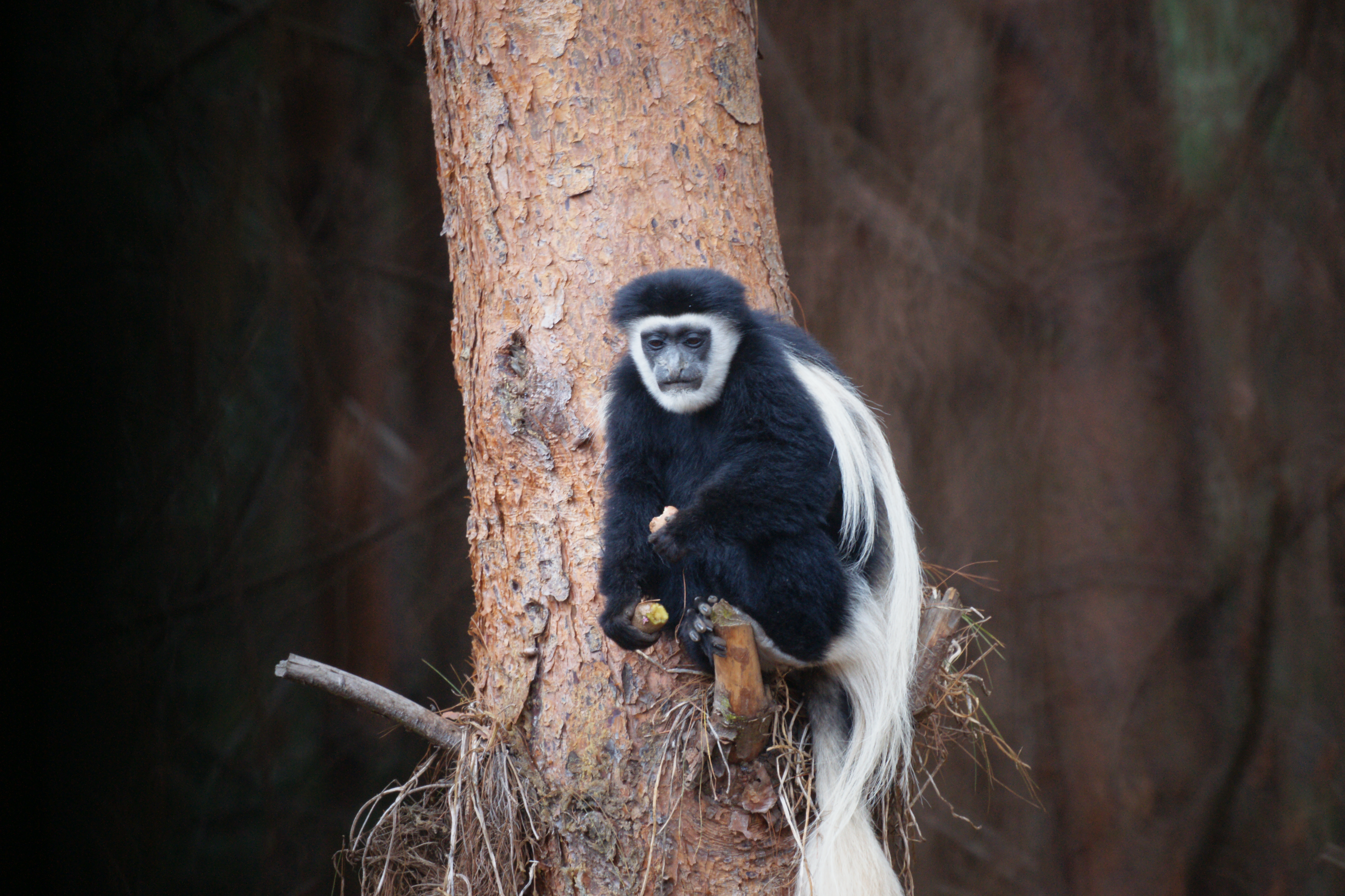 Oostelijke franjeaap op de Kilimanjaro